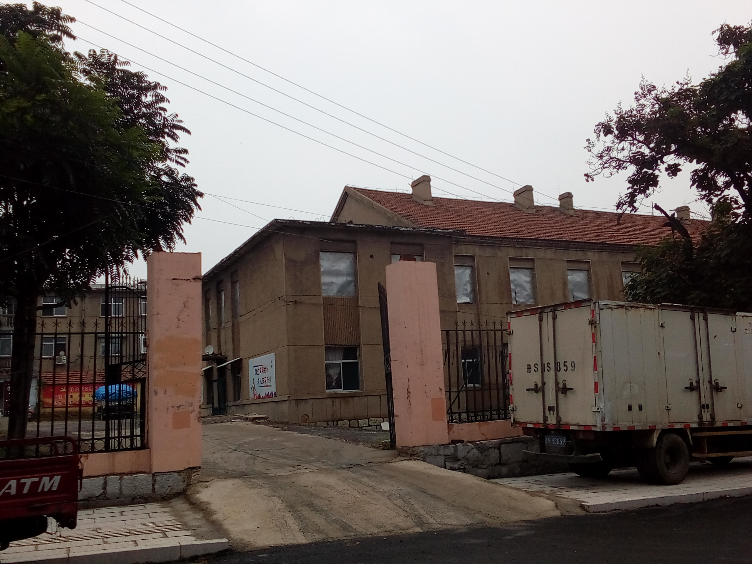 西关街的莱芜教委（教育局）大院旧址